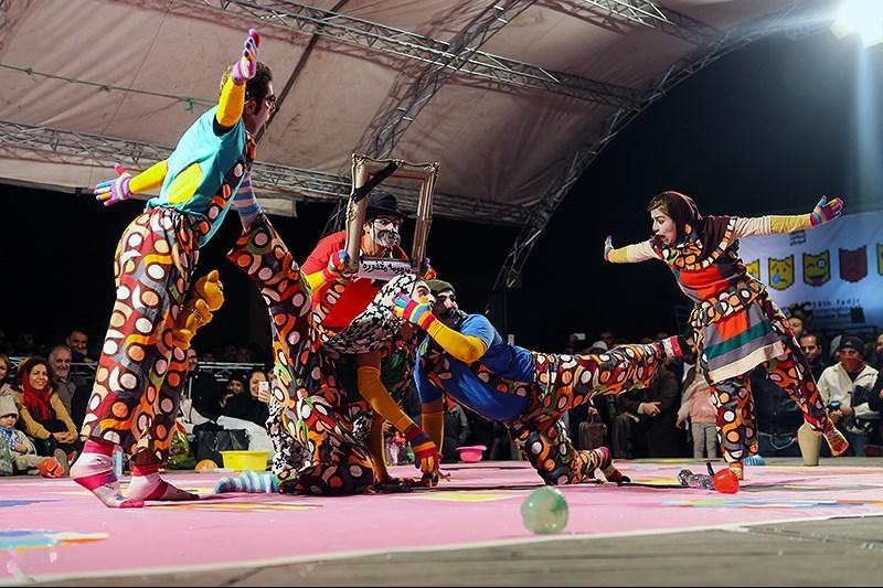 Street Performances Draw Attention in Fajr Theater Festival - TEHRAN (Tasnim) – Theater groups delivered street performances in a park near Tehran’s City Theater on Tuesday evening, during the Fajr International Theater Festival. The event would go on until January 29.